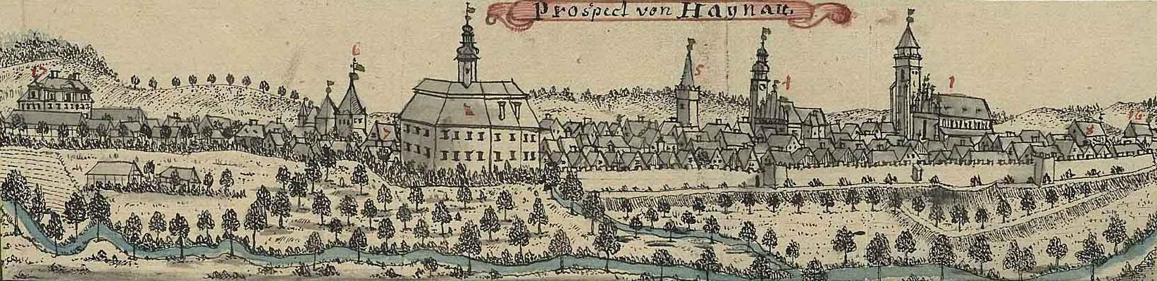 Panorama miasta Chojnowa, sporządzona przez Friedricha Bernharda Wernhera i umieszczona w Topographia oder Prodromus Delineati Principatus Lignicensis Bregensis, et Wolaviensis [...]